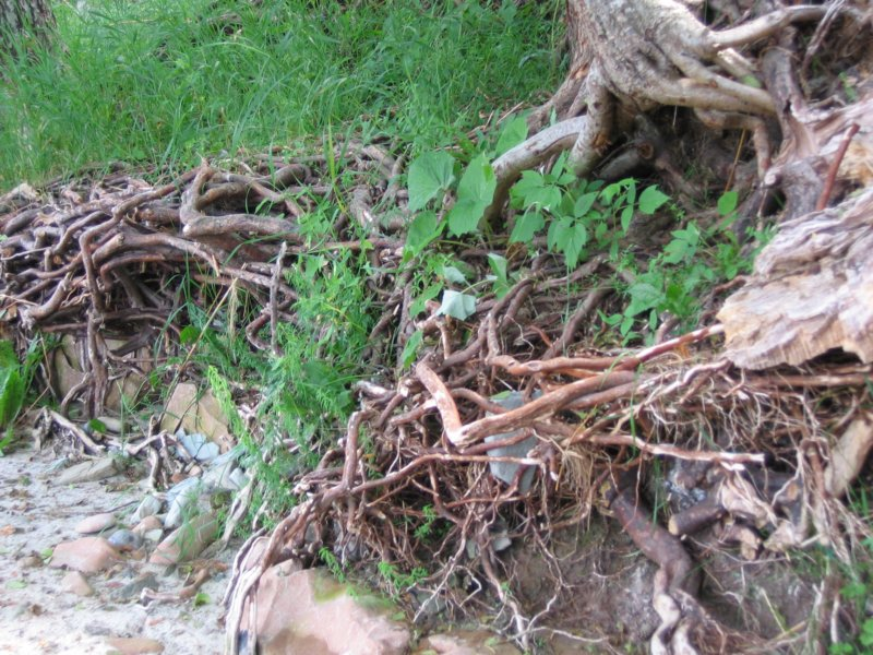 Rannaastang Norrkeldi ja Austerkeldi vahel